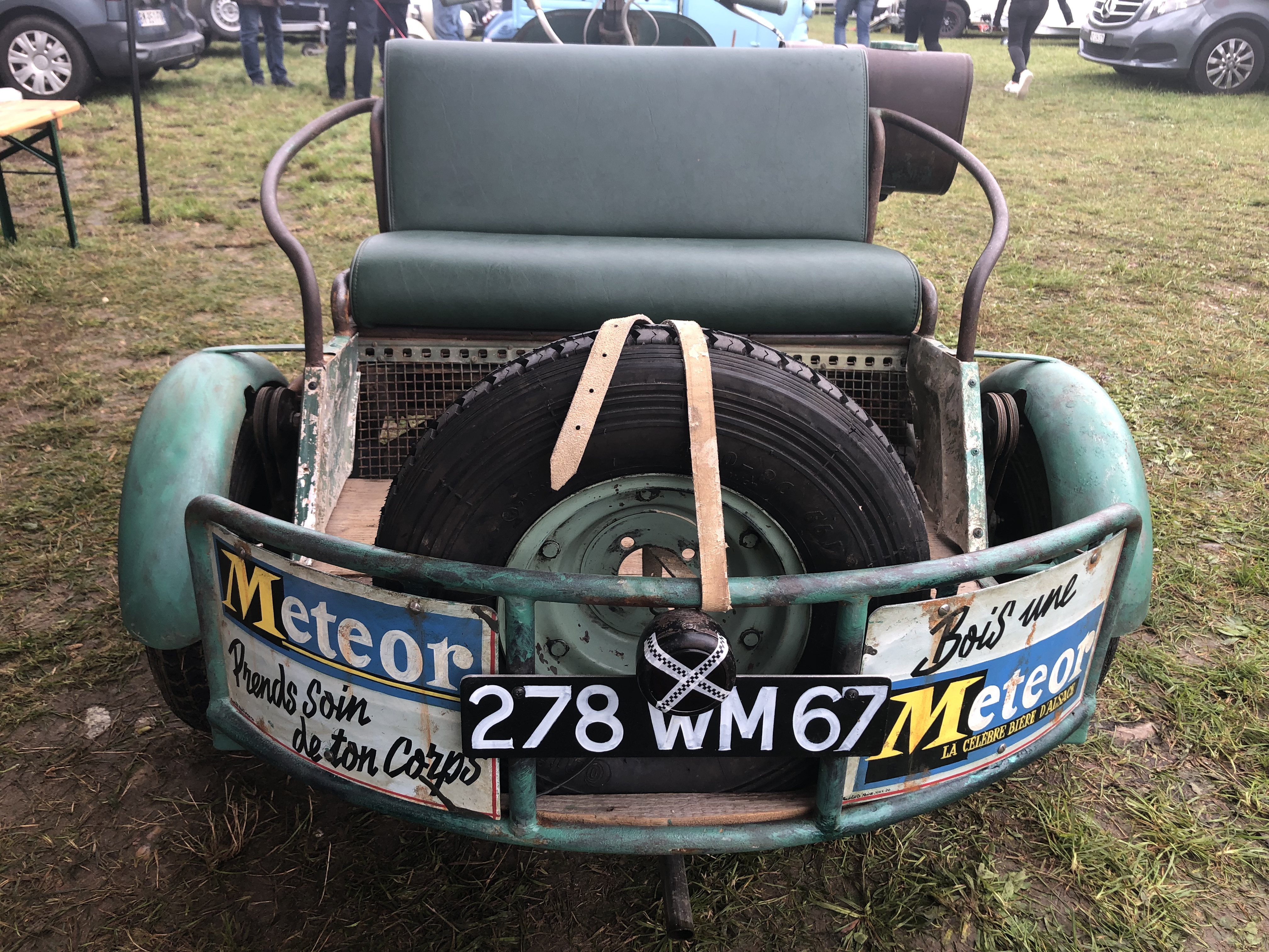 publicité Météor sur une Vespa 1954